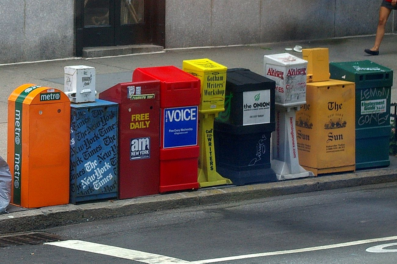 Zeitungsautomat